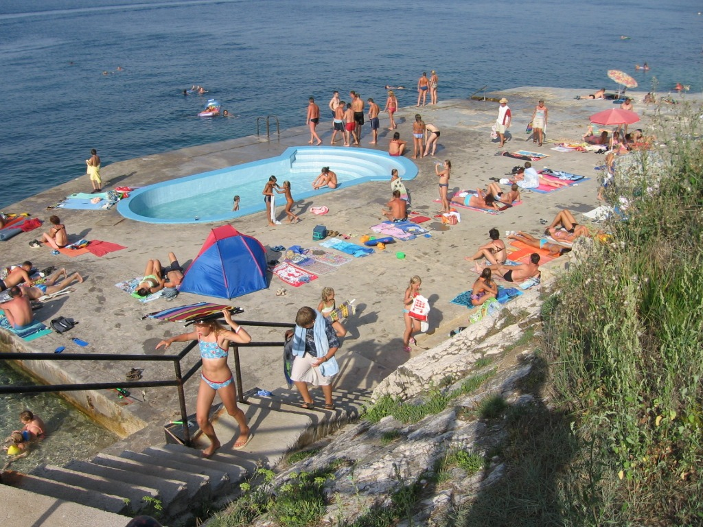 Crveni vrh plaža